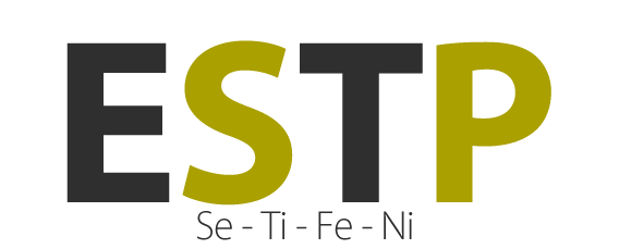 Logo ESTP MBTI.